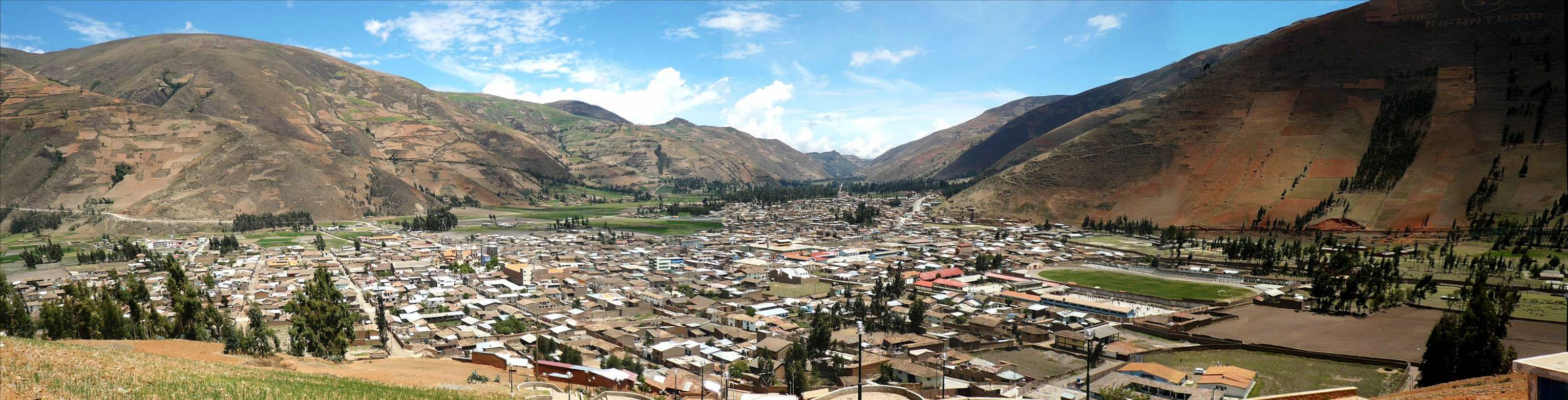 Imagen Panorámica de la ciudad de Pampas - Tayacaja - Huancavelica, Perú.